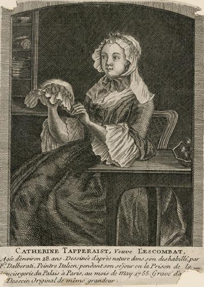 Catherine Tapperaist par Francesco Dalberati en 1755. Estampe conservée à Versailles sous la référence LP70.113.1